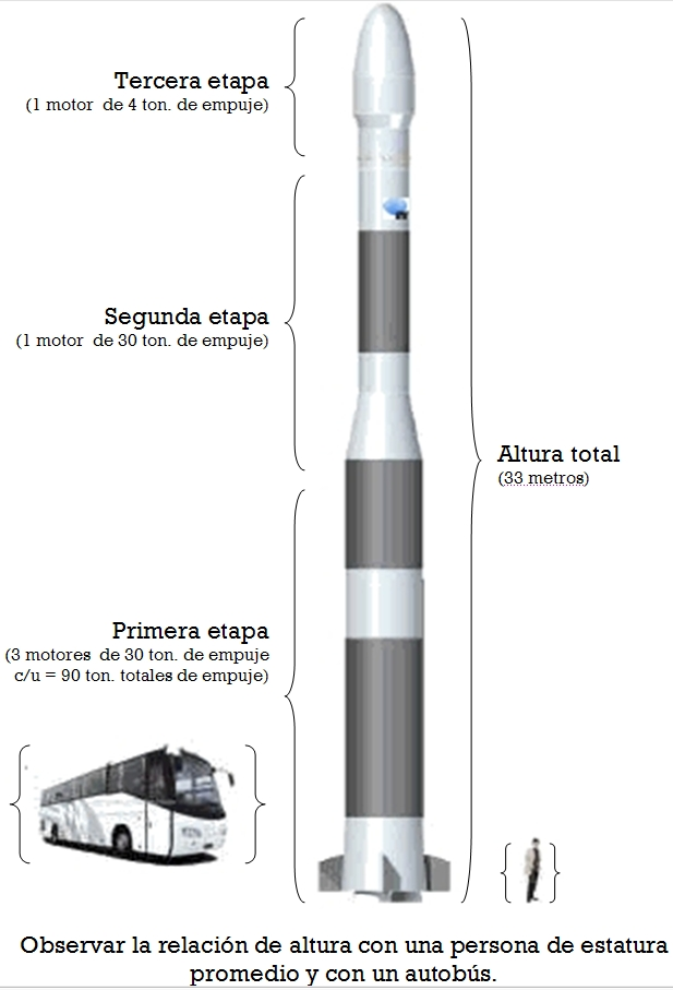 Infografía Tronador II